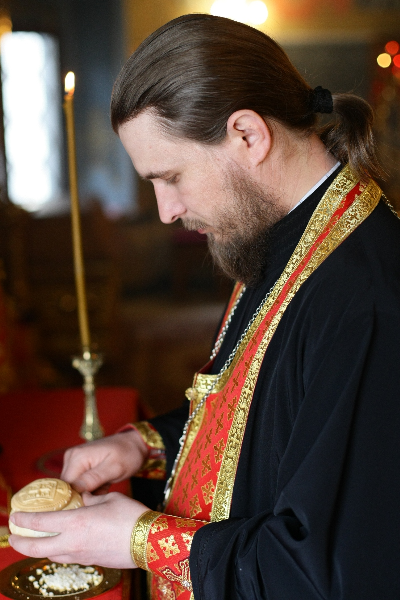 Совершение проскомидии. Светлая седмица.